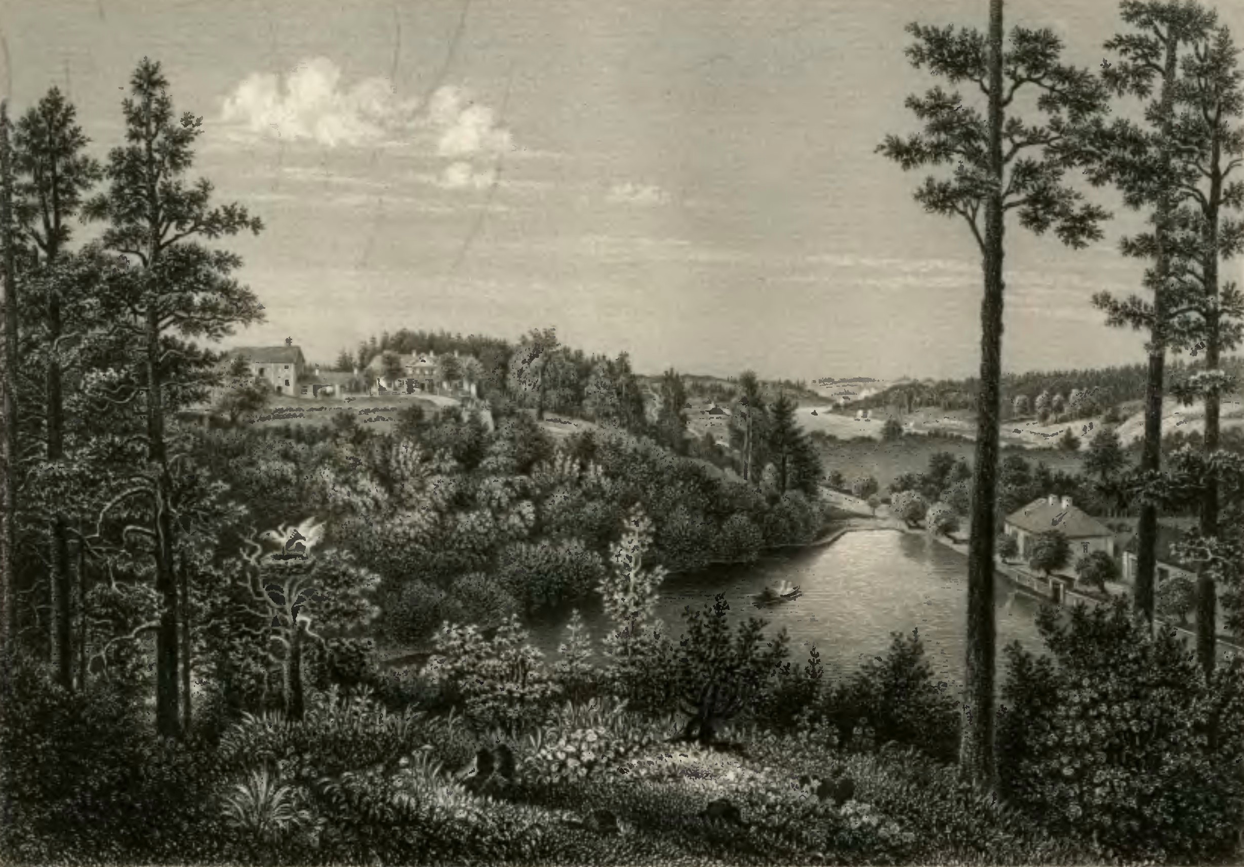 Vaade Lielborne mõisale (Stavenhagen)